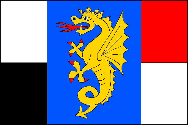 Vlajka obce Skalsko